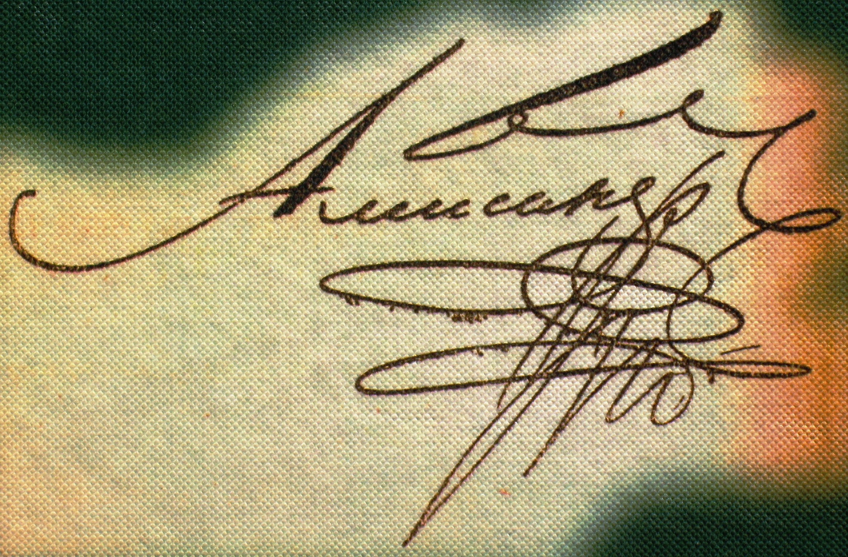 Imperator Alexander I signature.